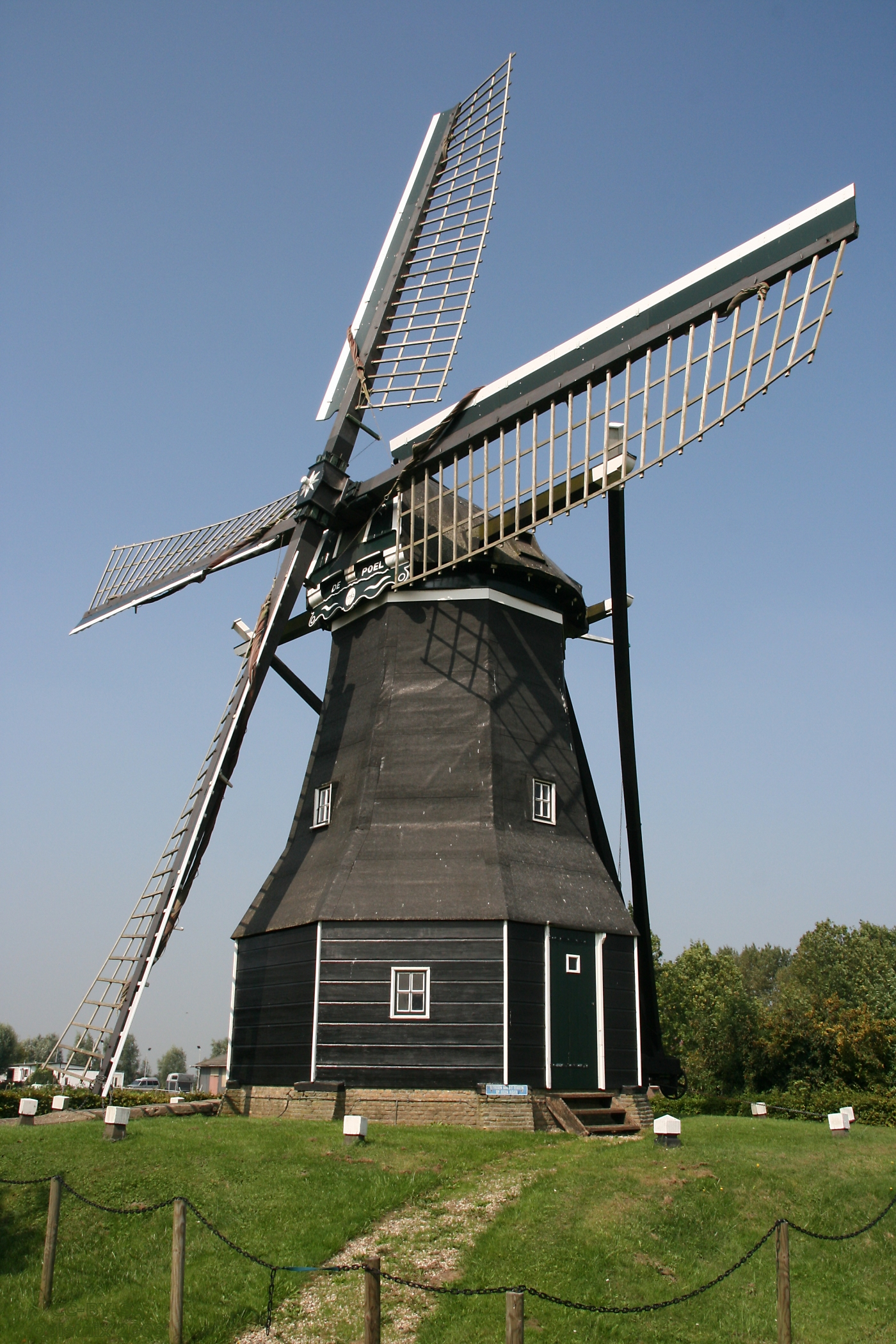 Nisse: molen De Poel